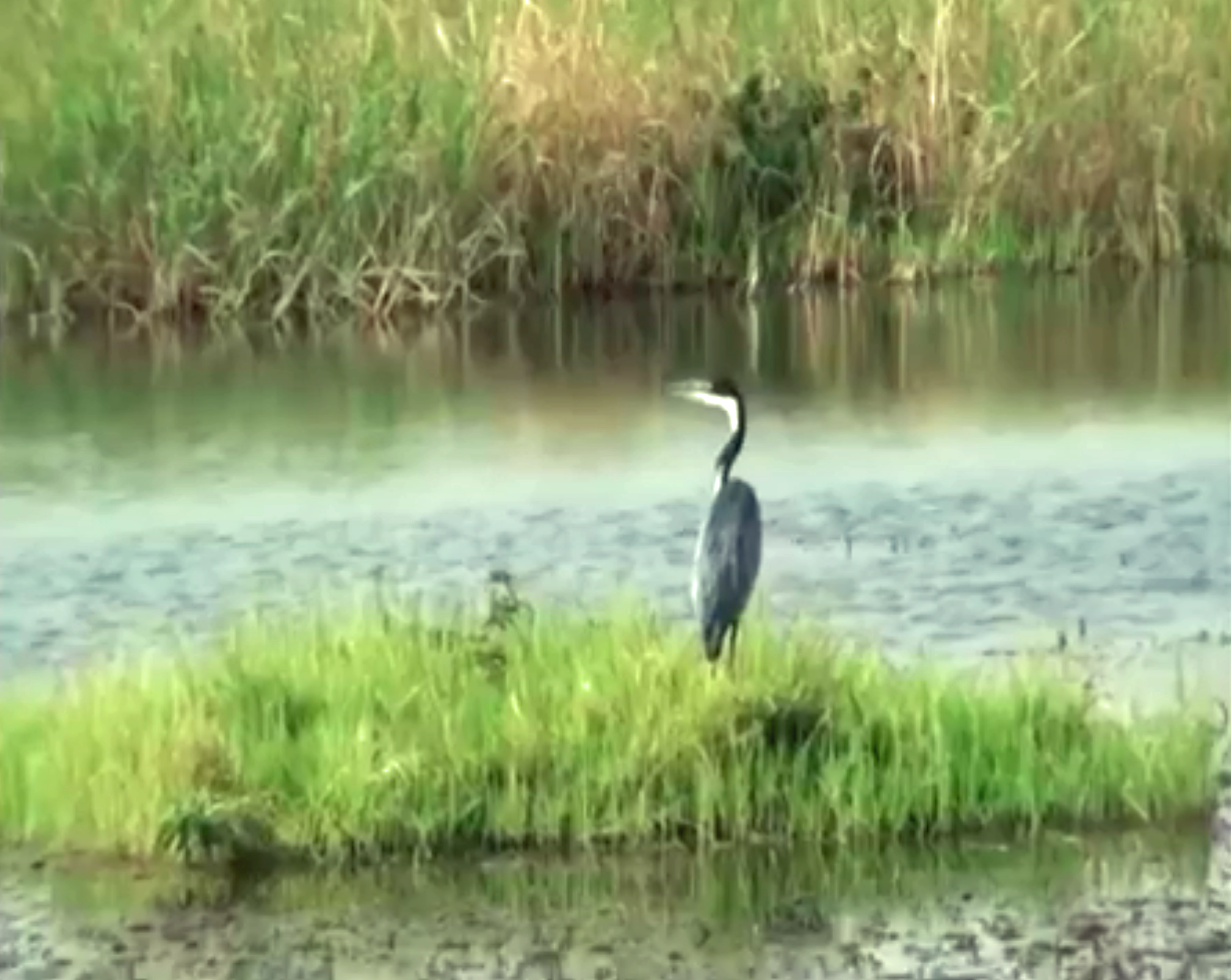 lac tisongo dans l'arrondissement de mouanko, reserve de la faune de douala-édea